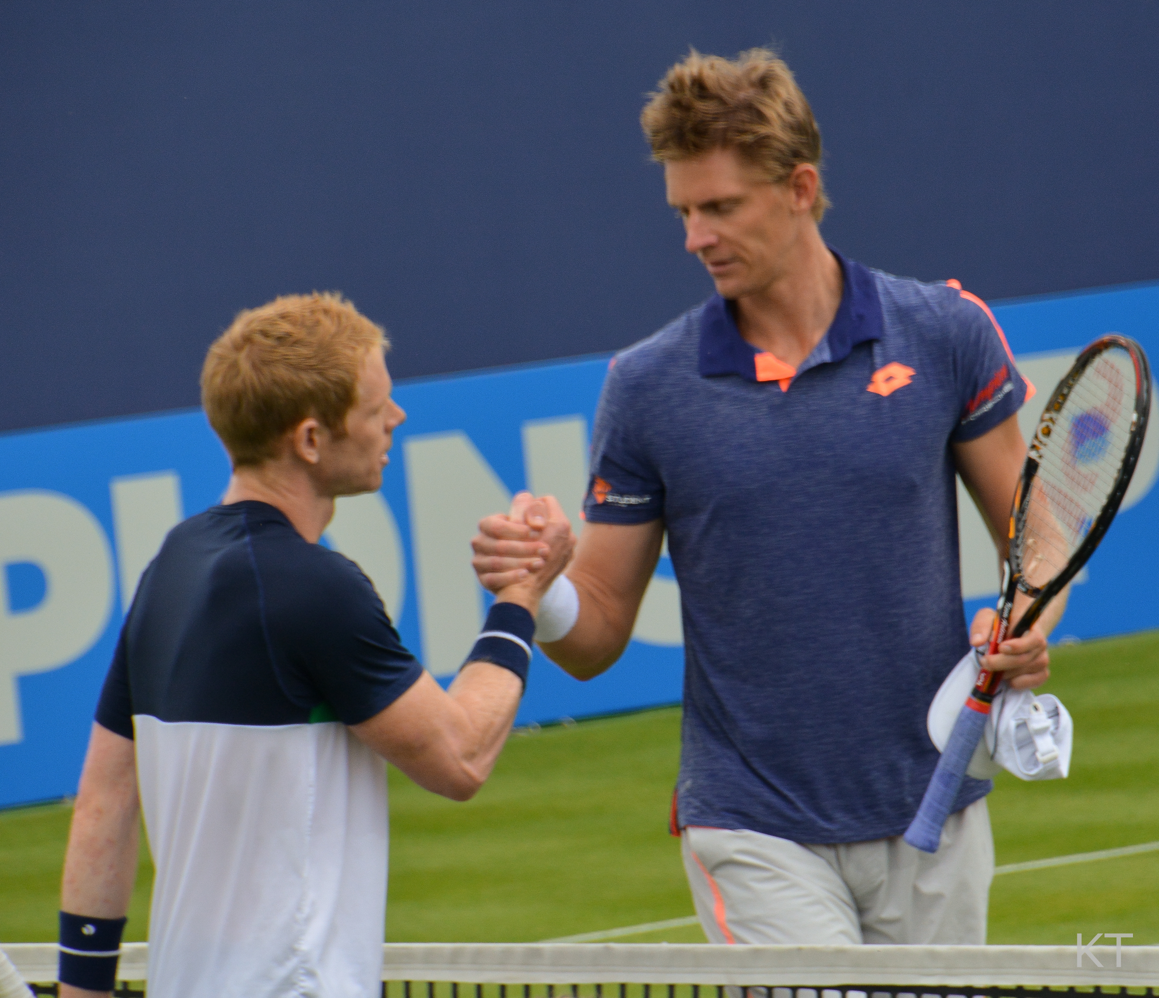 Ed Corrie & Kevin Anderson